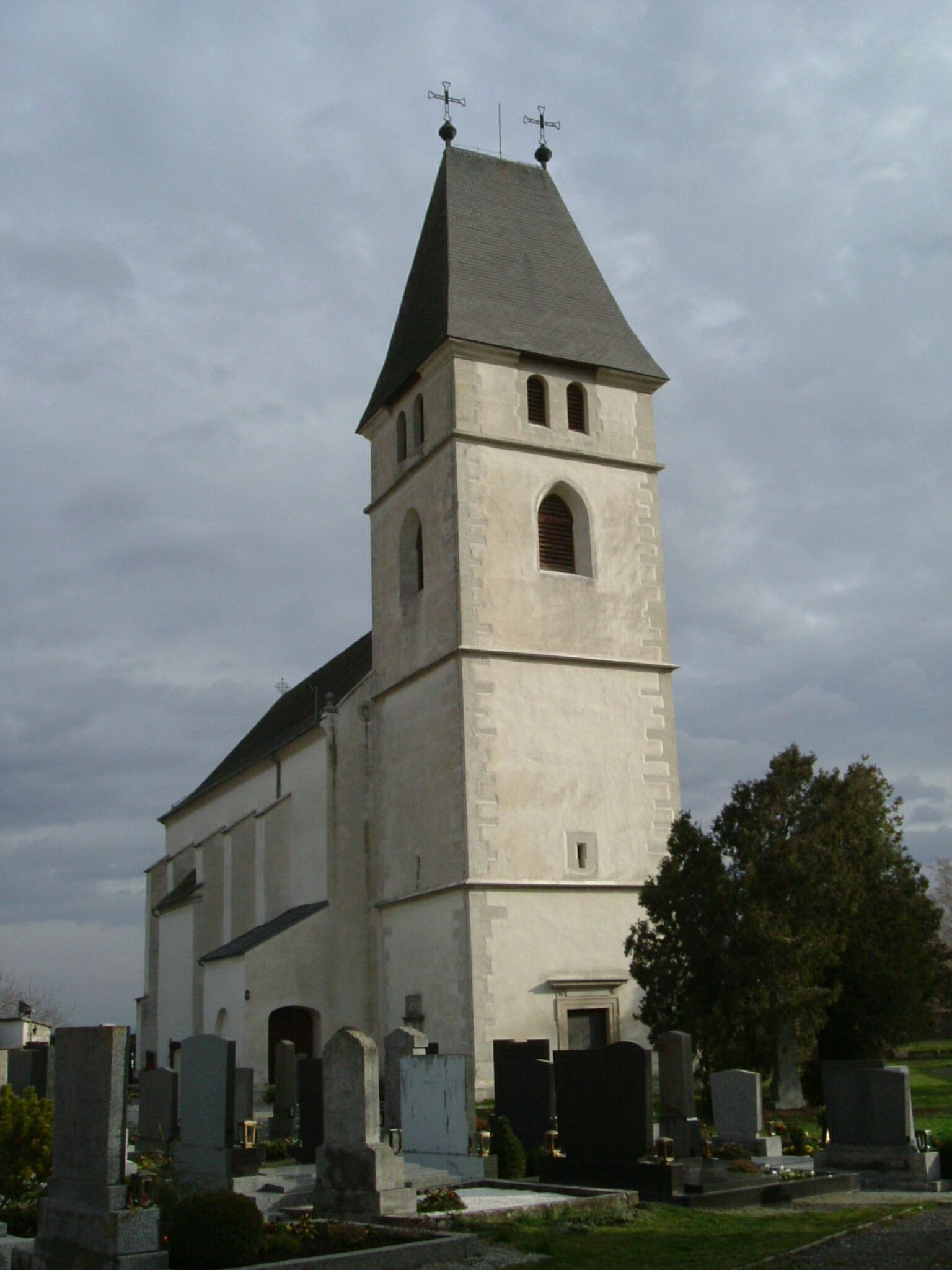 Breitenbrunn, Austria - Burgenland Church